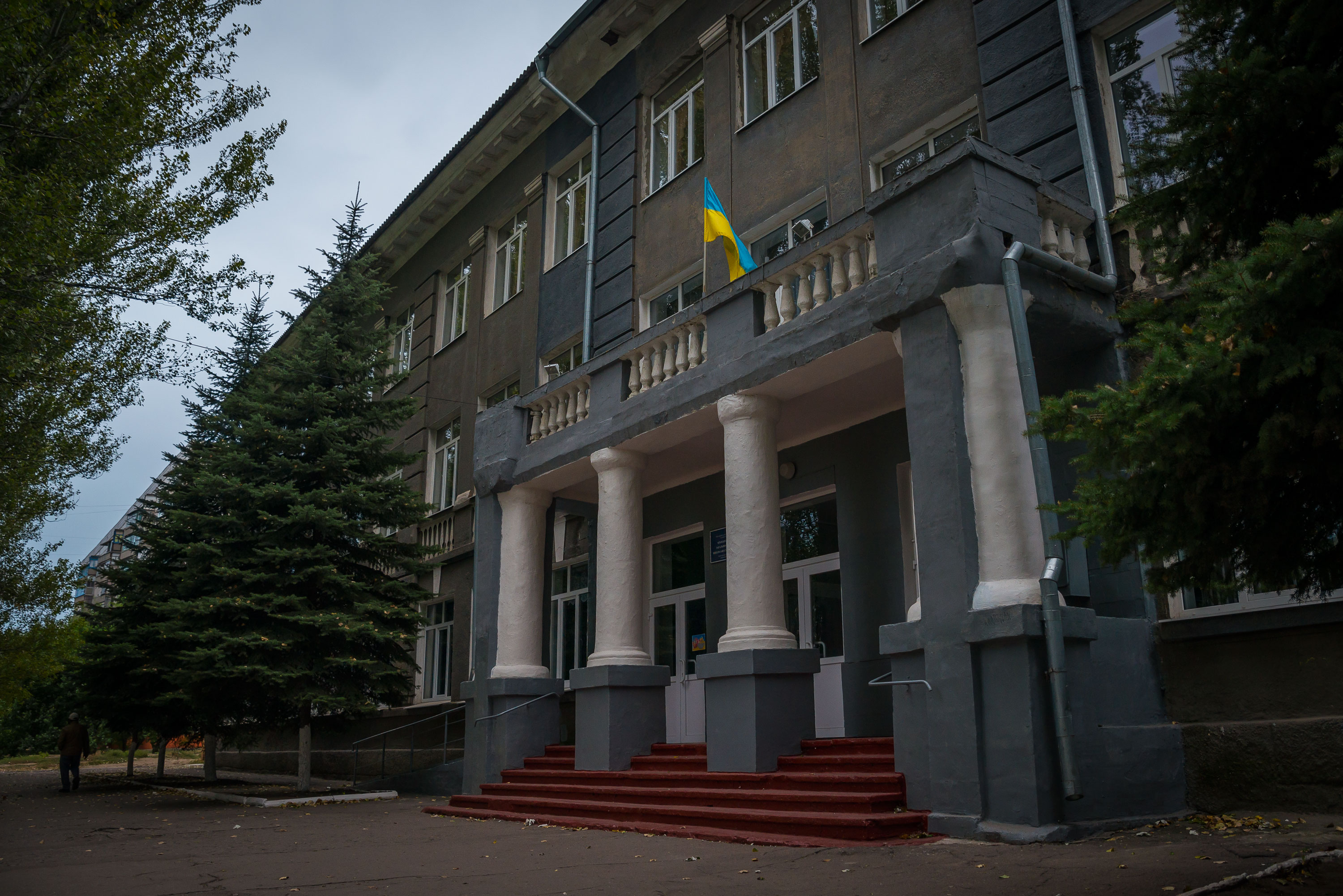 Школа, у якій навчався народний артист УРСР Биков Л. Ф, Краматорськ, вул. Косіора, школа № 6